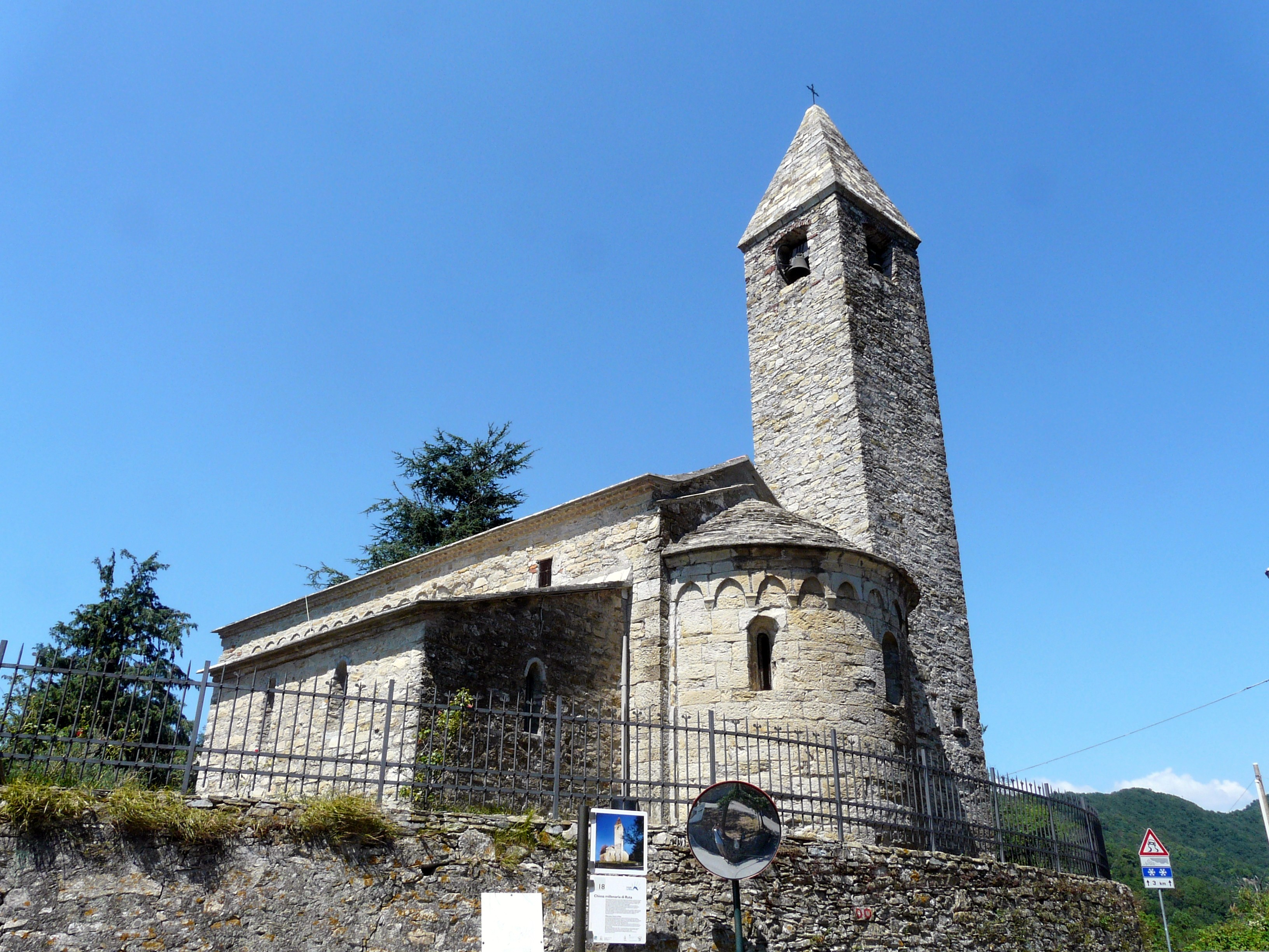 Serie di immagini esterne della chiesa millenaria di Ruta, Camogli, Liguria, Italia